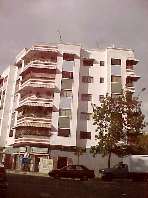 Avenida Presidente Medina (Avenida Victoria) en el municipio Libertador, Distrito Capital - Venezuela (2000)